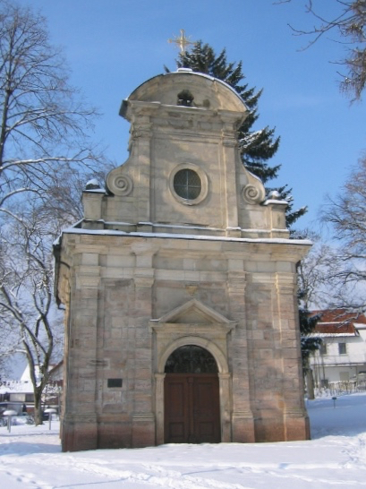 Schlosskapelle Bonndorf